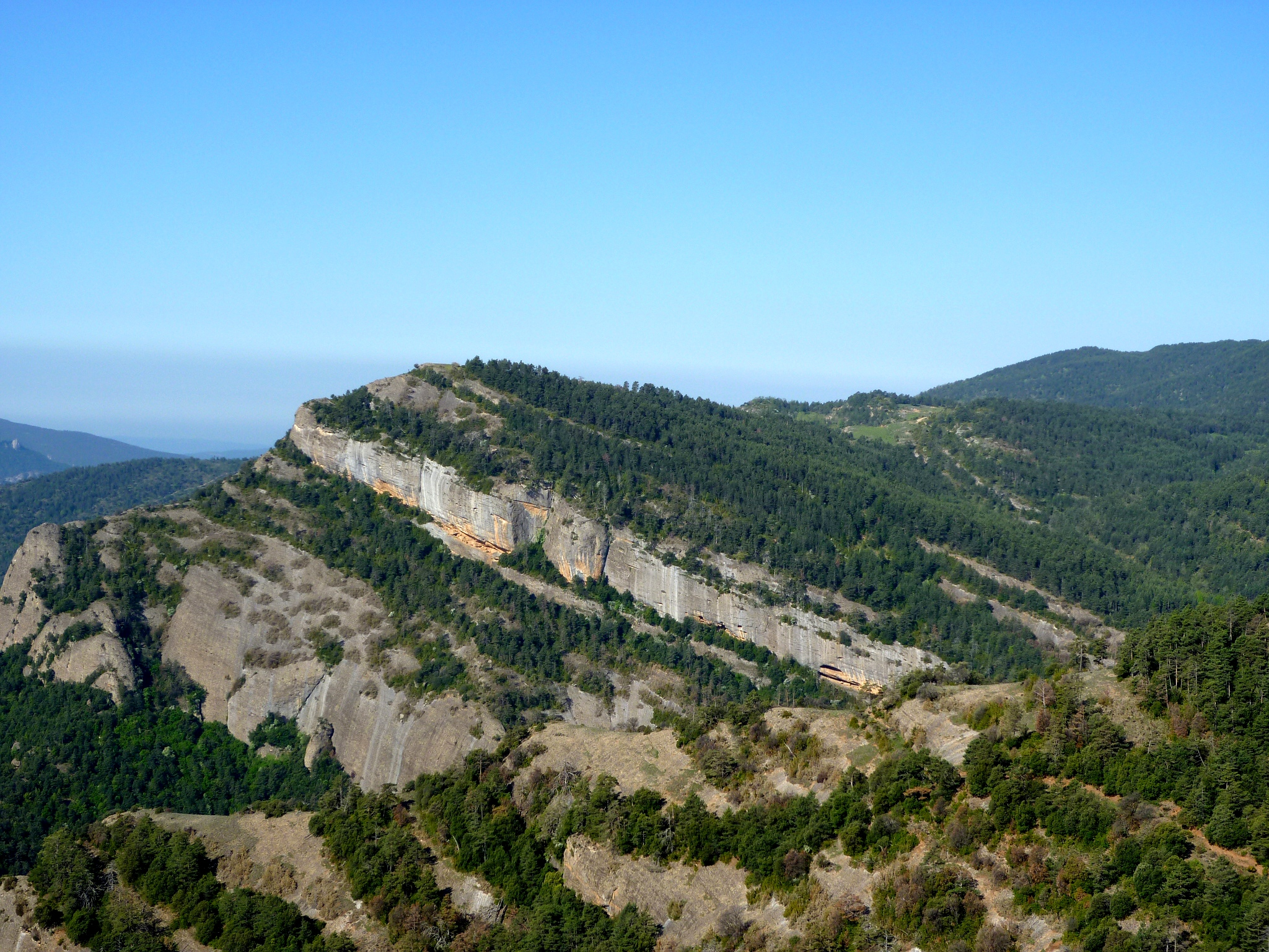 El Cap de Tolosa, a Vilacireres (Gósol - Berguedà) This is a a photo of a natural area in Catalonia, Spain, with id: ES510193